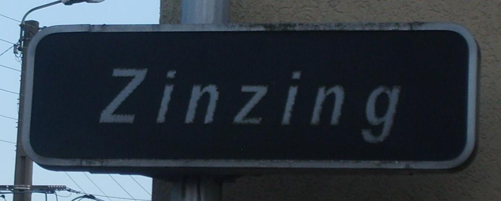 Panneau "Zinzing" à Alsting en Moselle, France.